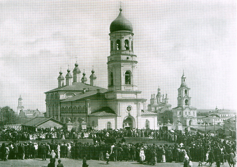 Voskresenskij sobor (cafedral) na Vyatke